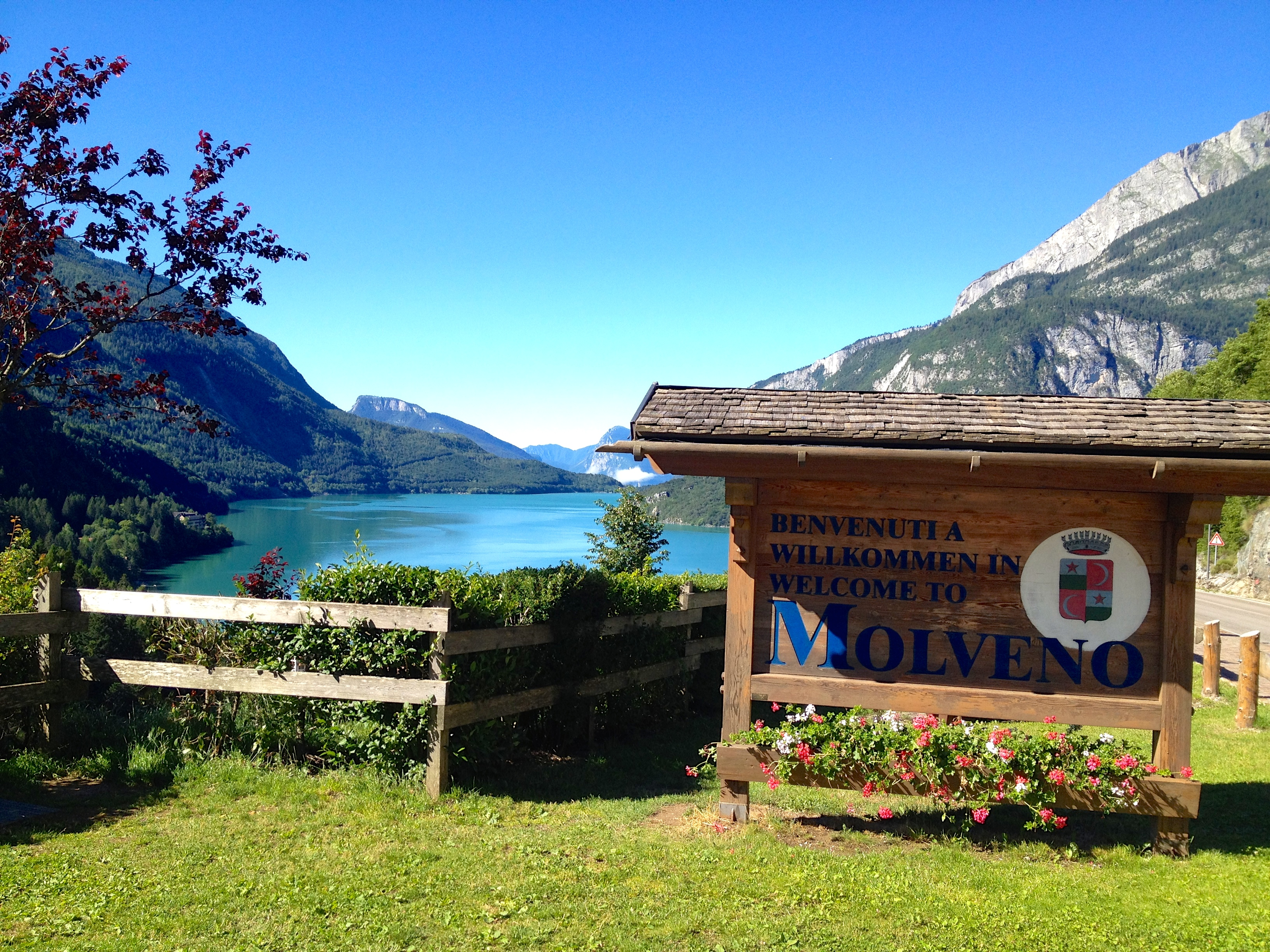 il lago di Molveno visto dall'entrata del paese